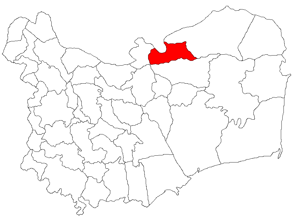 Categorie:Hărţi ale judeţului Tulcea